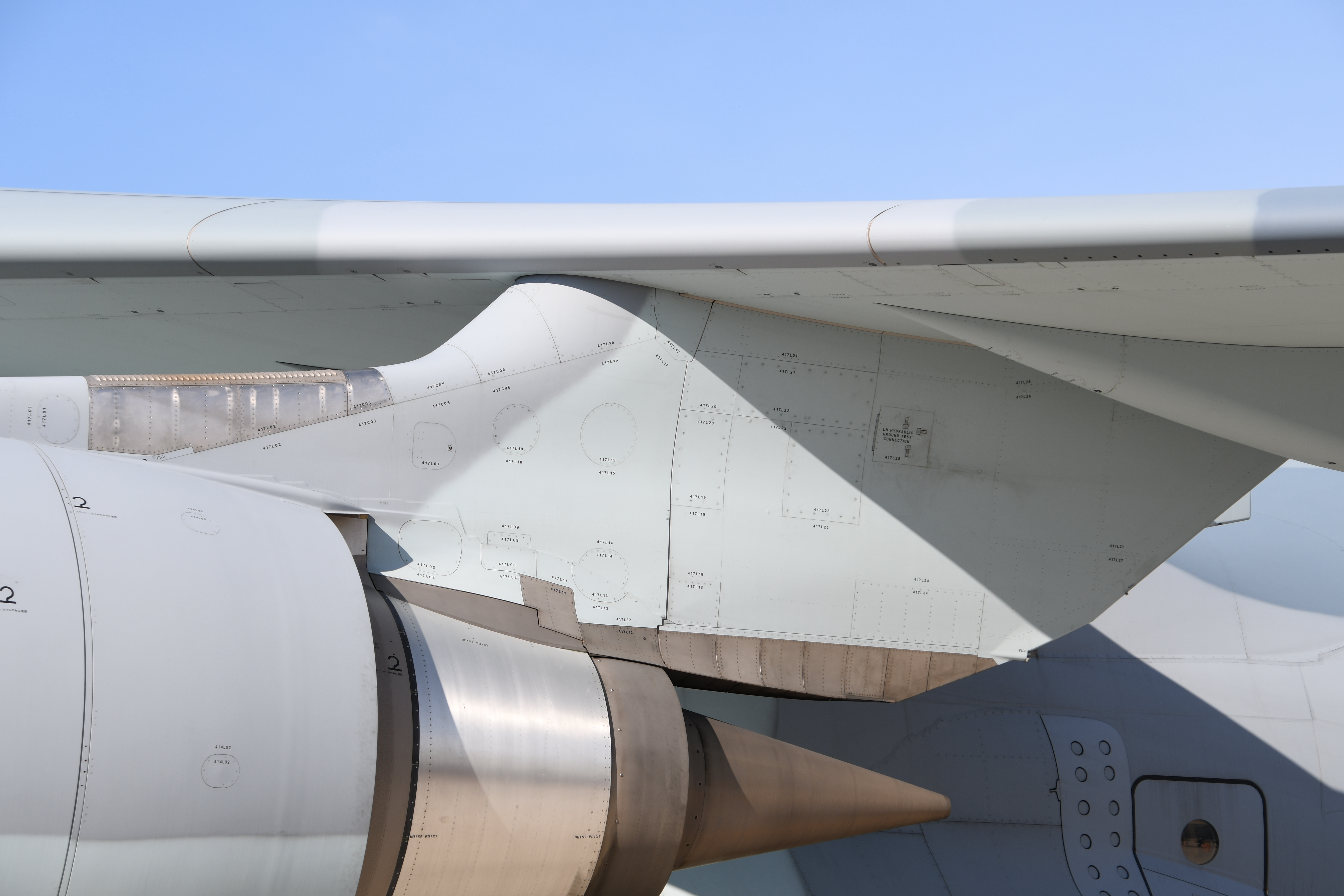 航空自衛隊 C-2輸送機（78-1205号機） 左主翼側エンジンパイロン 左前面。2018年3月3日 小牧基地にて。